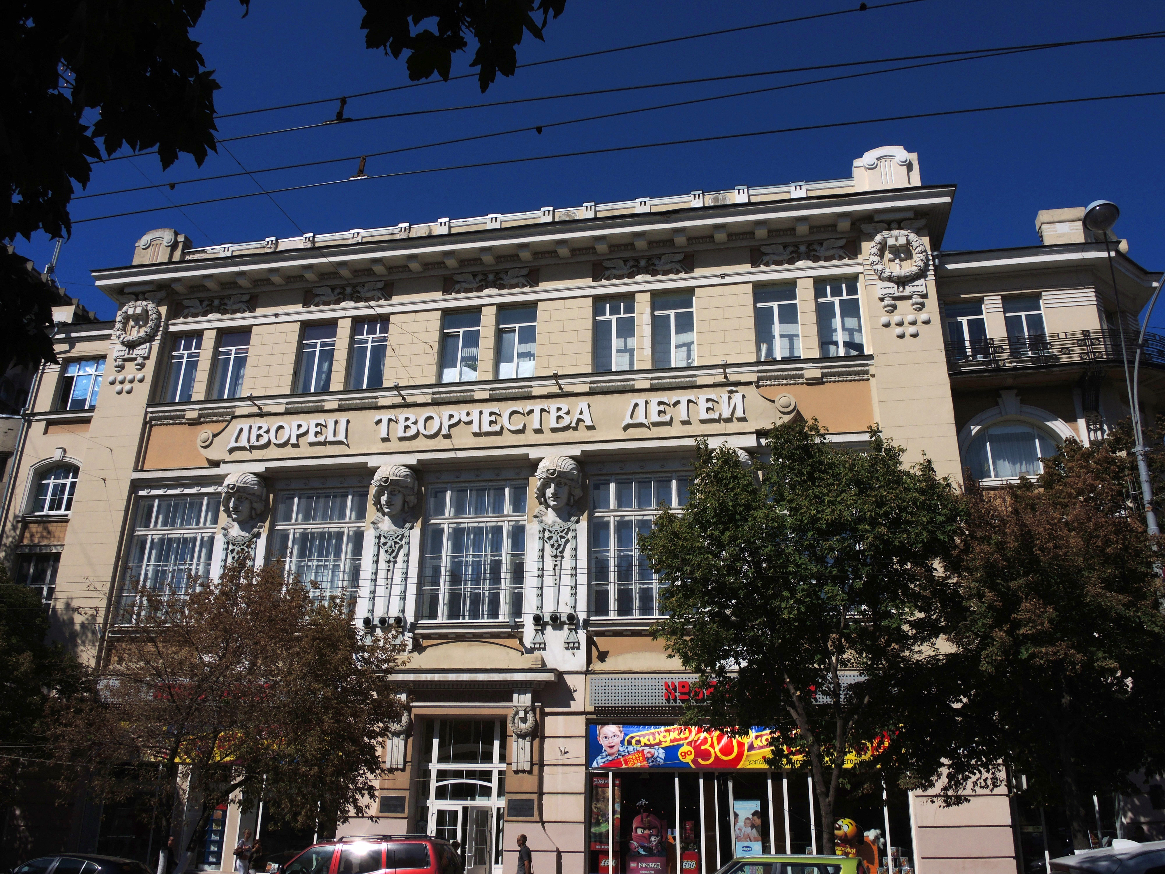 Здание правления Волжско-Камского банка: улица Большая Садовая, 55, Ростов-на-Дону, Ростовская область